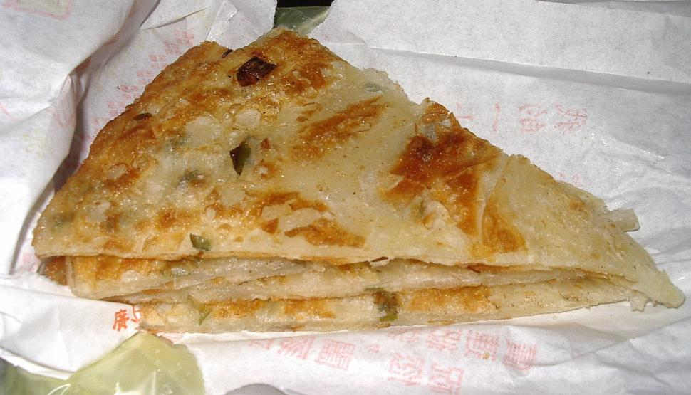 蔥油餅